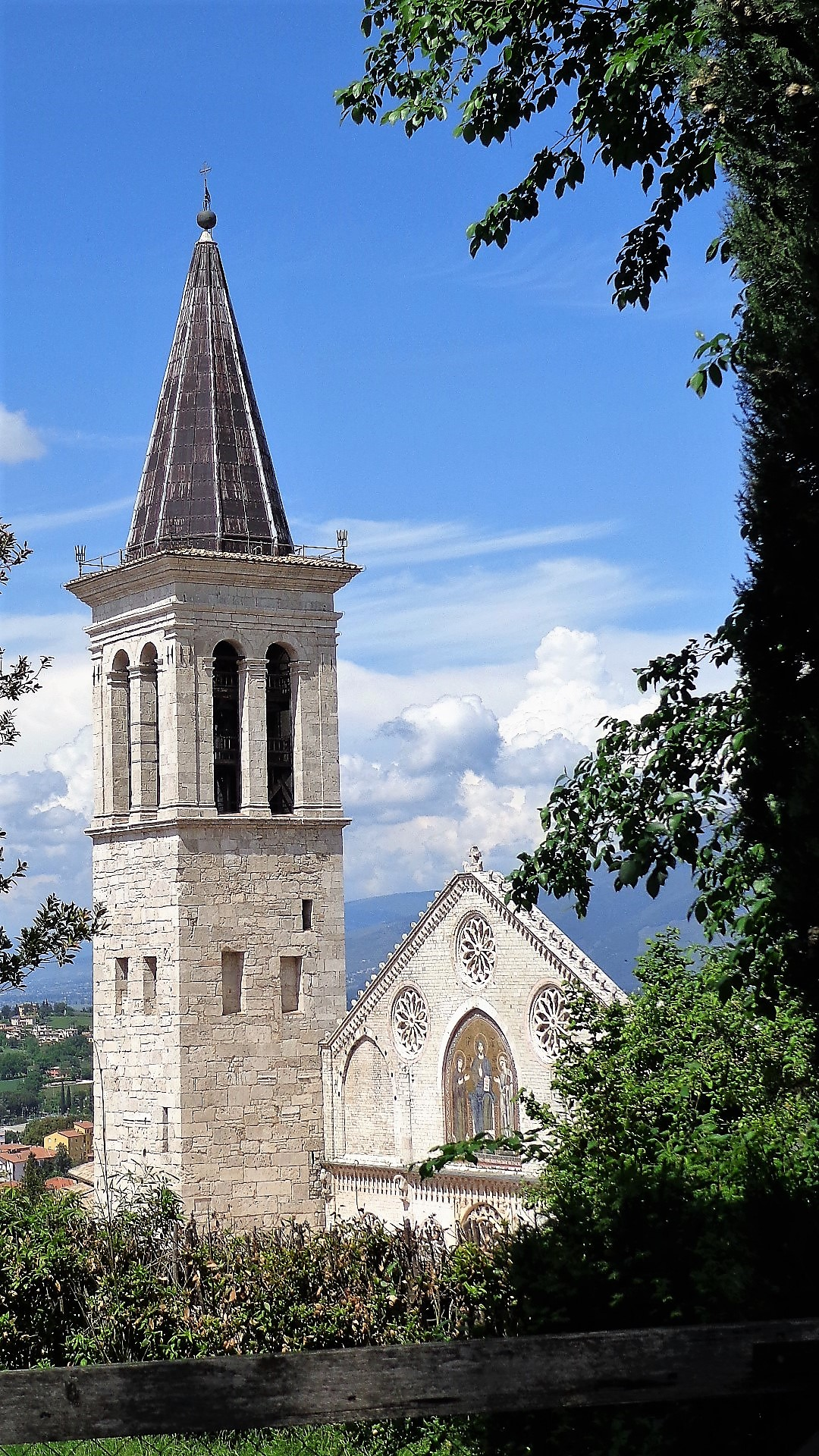 Duomo visto dal Castello